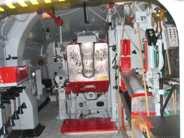 Stevnsfortet, 15 cm. kanontårn